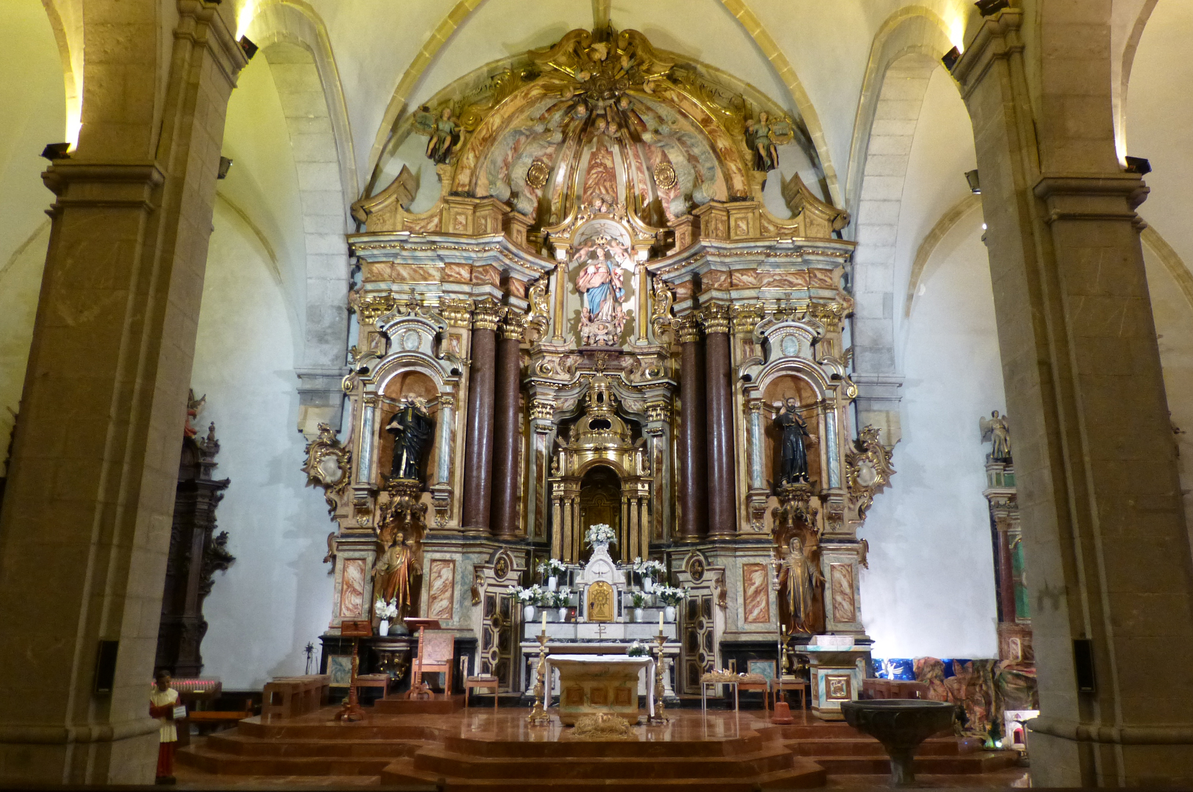 Ondarroa, retablo mayo de la iglesia de Santa María. Bizkaia, País Vasco (España)